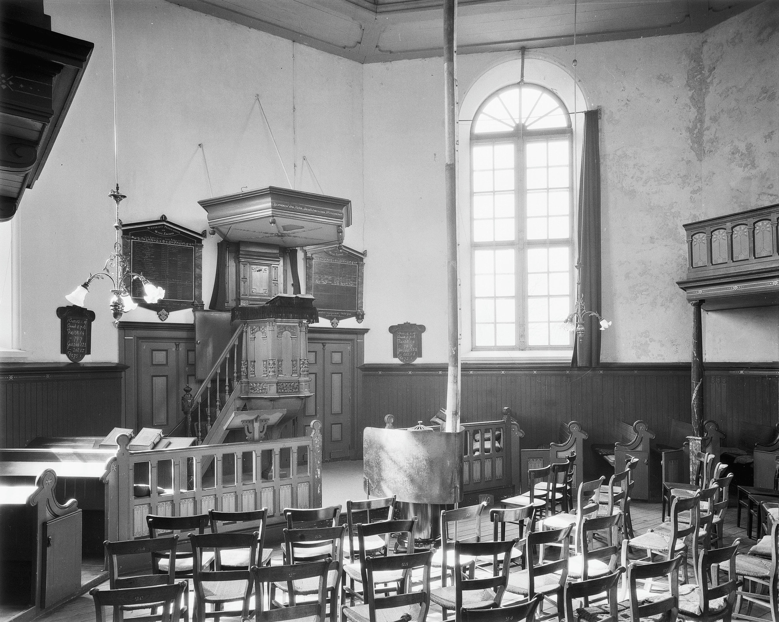 Nederlands Hervormde Kerk: interieur met preekstoel